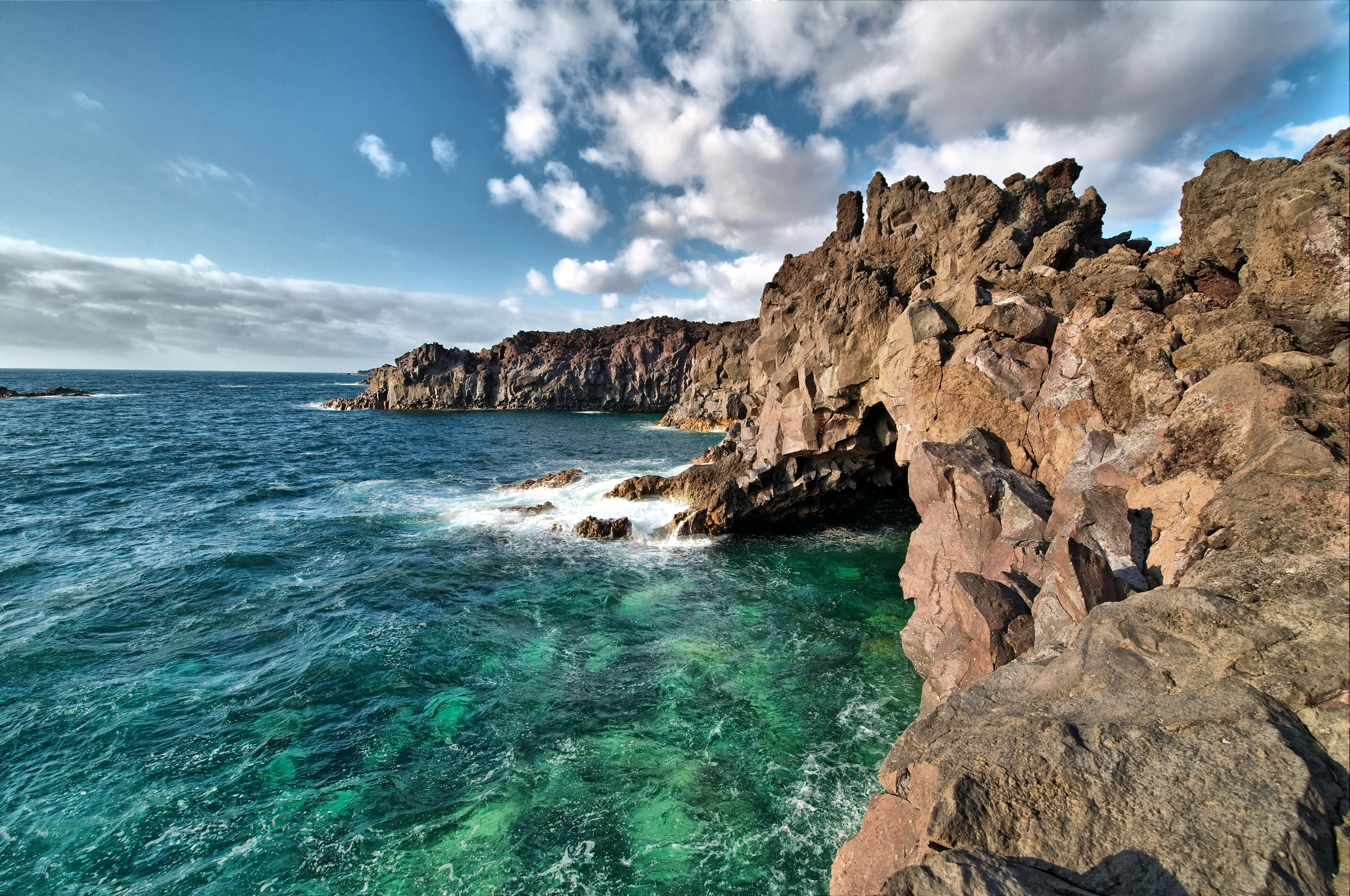 Costa Los Hervideros Lanzarote îles Cannaries (Espagne)